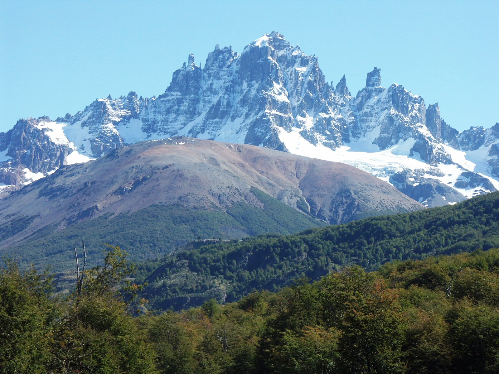 Camino de Balmaceda a Cochrane, Chile